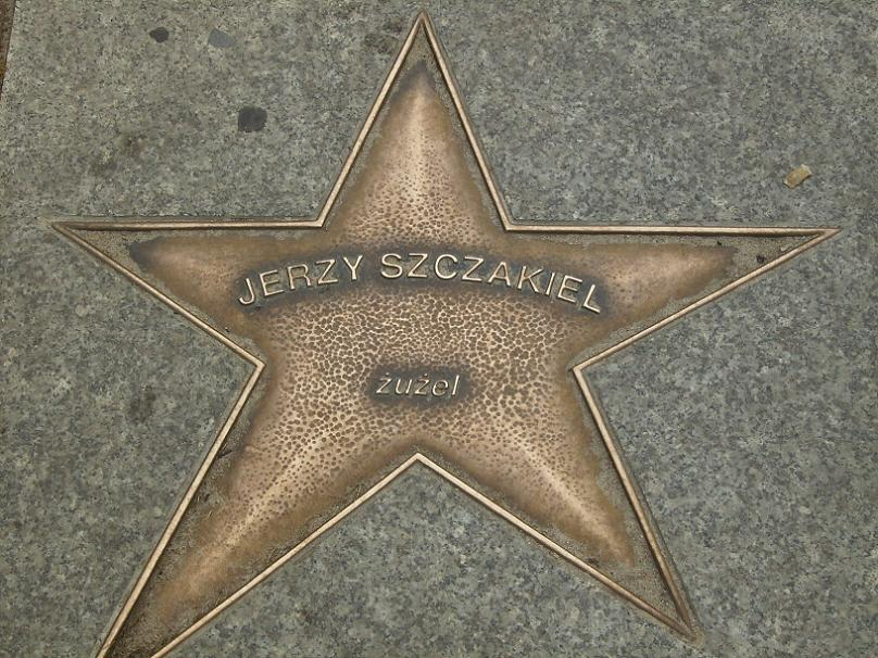 Gwiazda Jerzego Szczakiela na Alei Gwiazd Sportu we Władysławowie